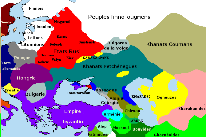 Situation politique de l'Eurasie aux alentours de l'an 1000